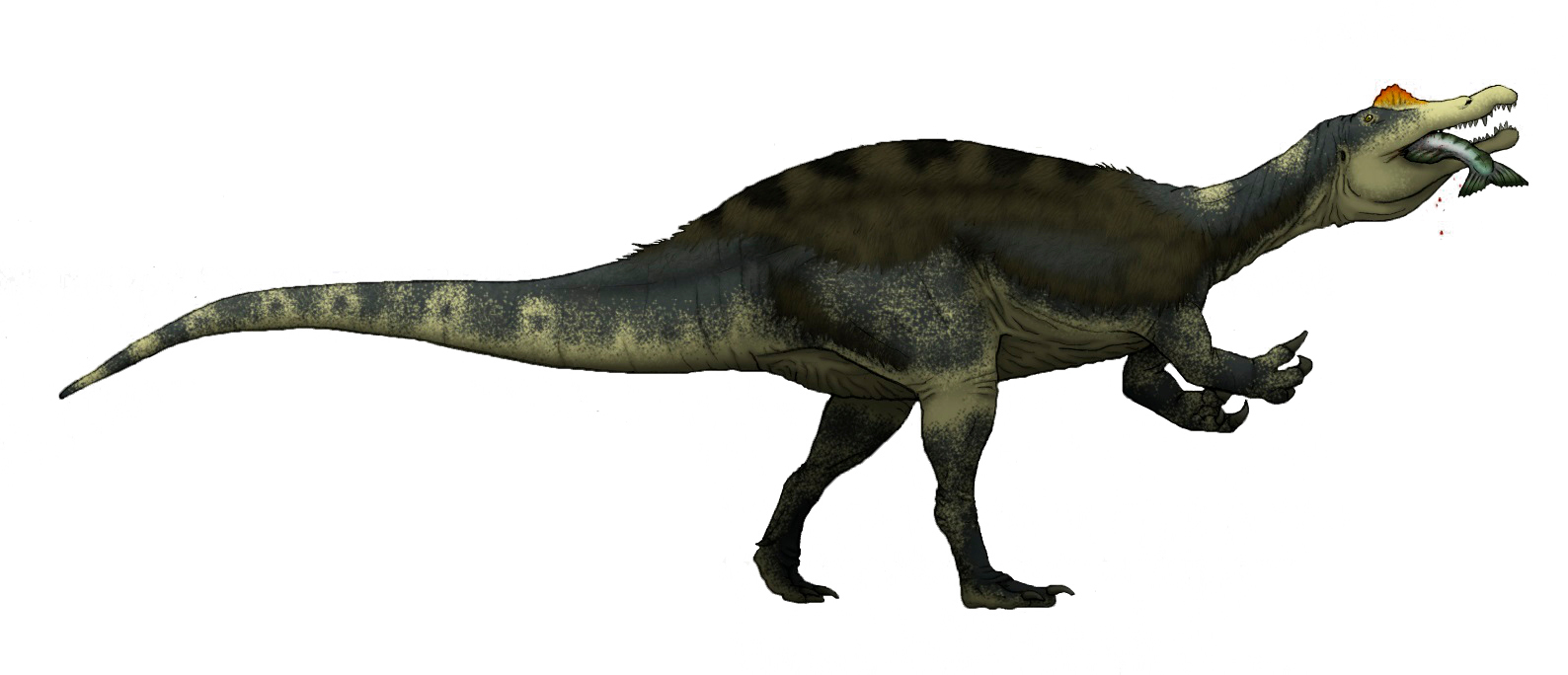 Vallibonavenatrix cani. Credits to Felipe Elias.